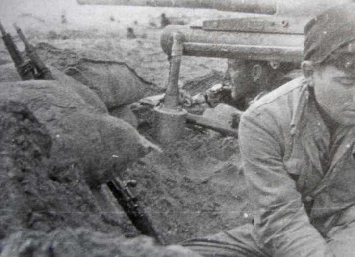 Granata anticarro L in una foto dell'epoca